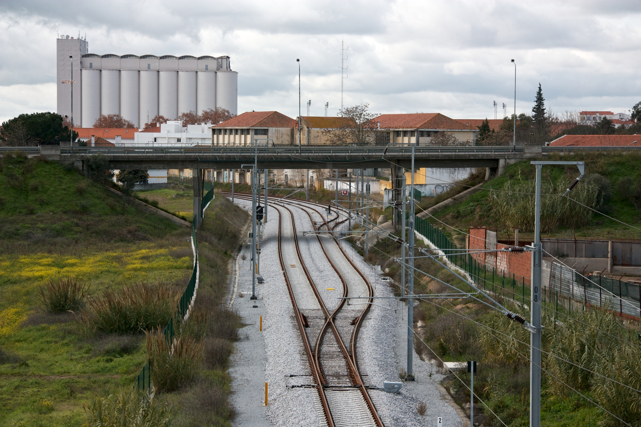 Via férrea: Linha de Évora [PK 117] Local: Évora Data e hora: 5 de Dezembro de 2012 [14h24] Sentido: Casa Branca